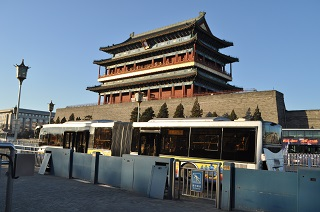 中文（中国大陆）: 快速公交一号线下车站台